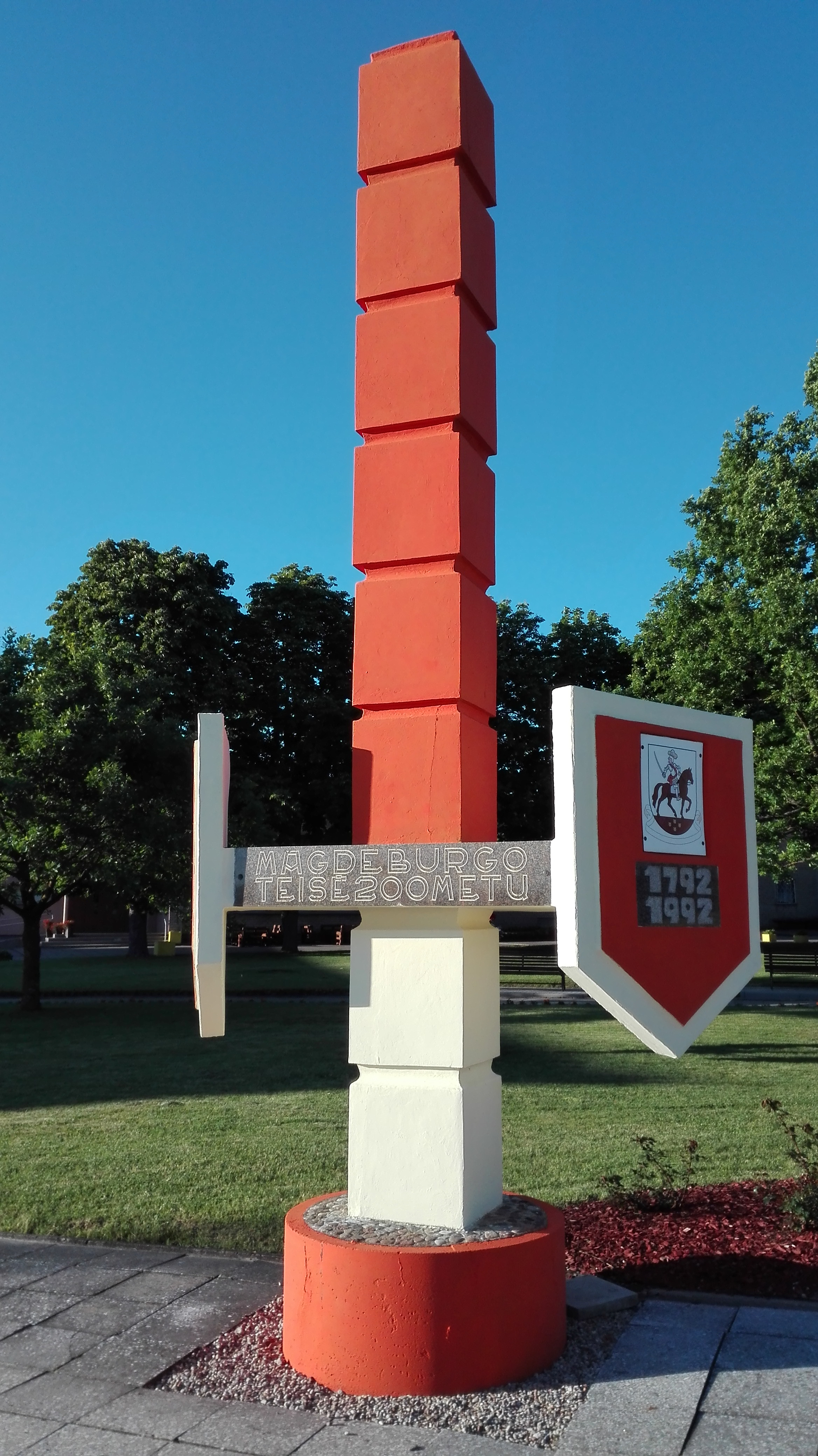 Paminklas. 200 metų jubiliejus, kai Veiviržėnam suteikta Magdeburgo teisė